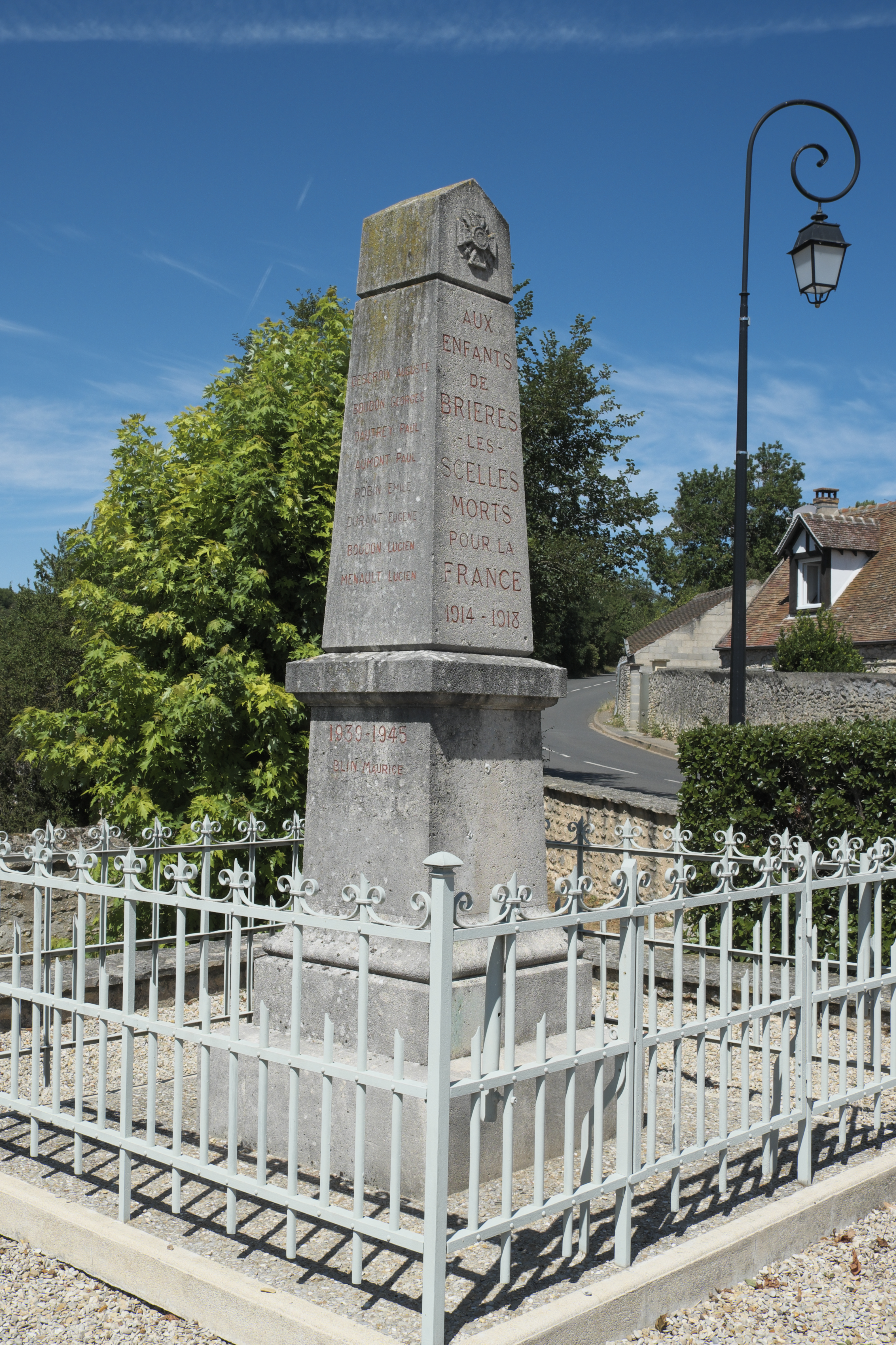 Kriegerdenkmal vor der katholischen Pfarrkirche Saint-Quentin in Brières-les-Scellés im Département Essonne (Île-de-France/Frankreich)